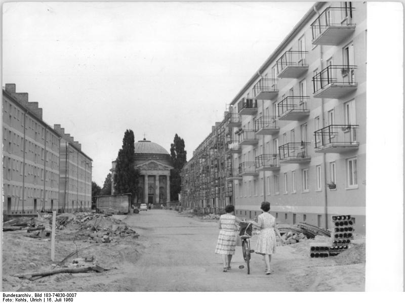 Zentralbild-Kohls-16.7.1960-Som-Qu- Vom 12.7. bis zum 2.8.1945 fand die historische Potsdamer Konferenz statt. UBz.: Potsdam, in der Joliot-Curie-Straße, im Hintergrund die Französische Kirche, rechts und links die ersten Großblockbauten in Potsdam.